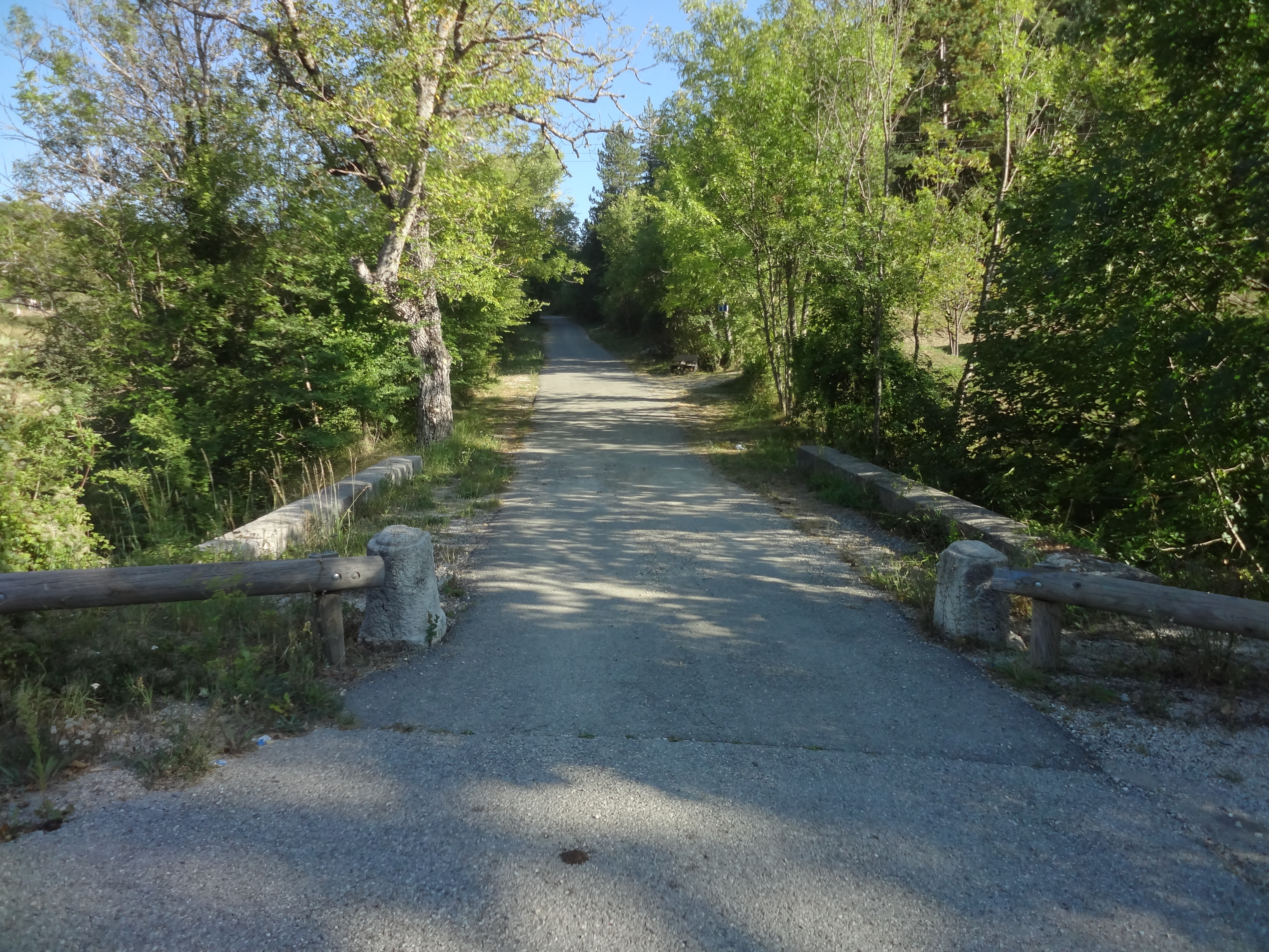 Pont de l'ancienne route nationale 85 ou route Napoléon, situé sur un délaisse à l'est de La Garde.